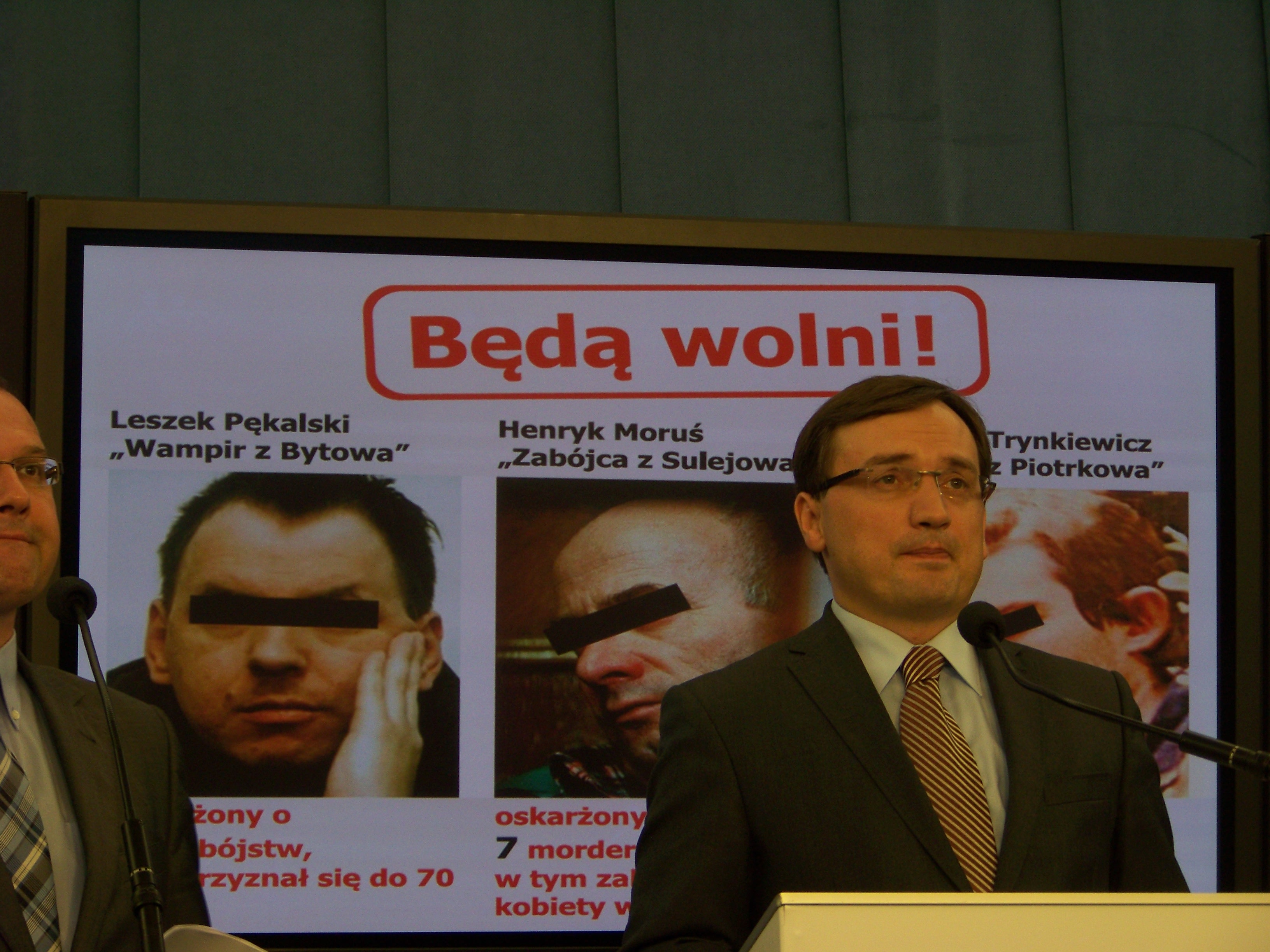 Konferencja prasowa: Leszek Pękalski, Henryk Moruś i Zbigniew Ziobro.